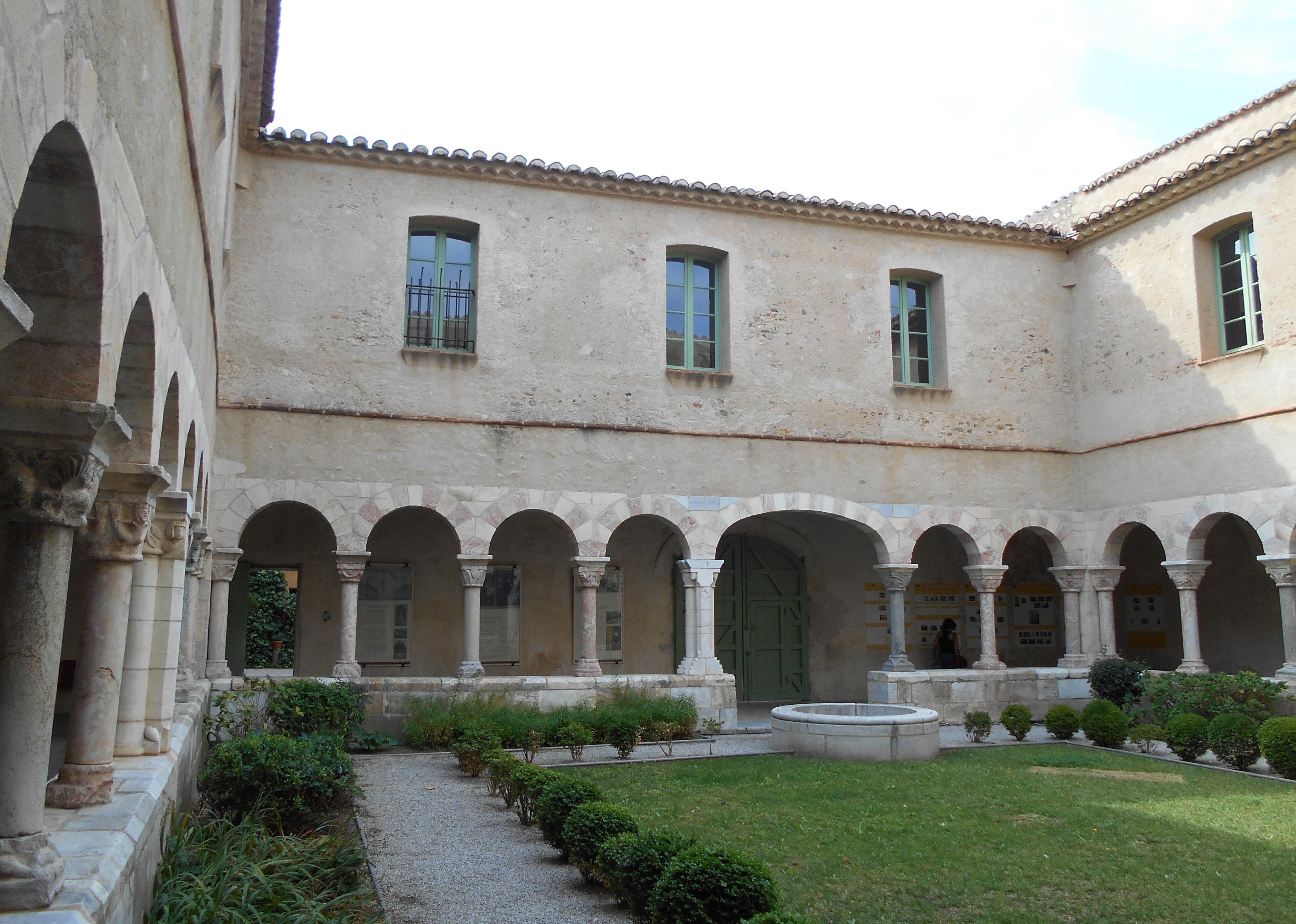 Galeria occidental del claustre de Sant Genís de Fontanes